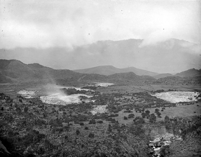 Negatief. Kawa Kidang, Diëng, Java